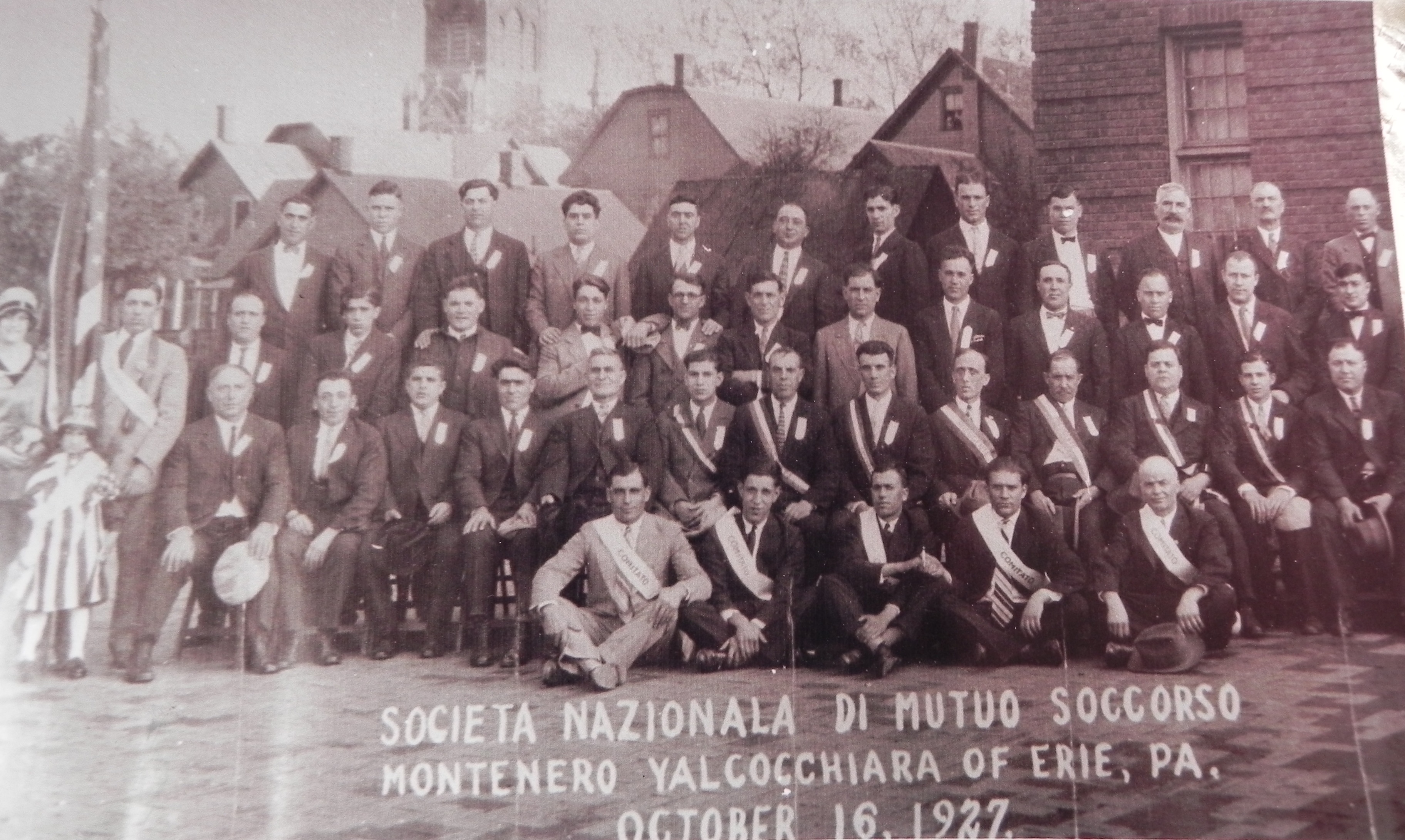 Società Nazionale di Mutuo Soccorso Montenero Val Cocchiara di Erie (Pennsylvania)